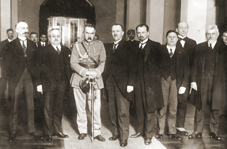 Polish Government under Prime Minister Kazimierz Bartel 1926 ( First Government of Bartel)